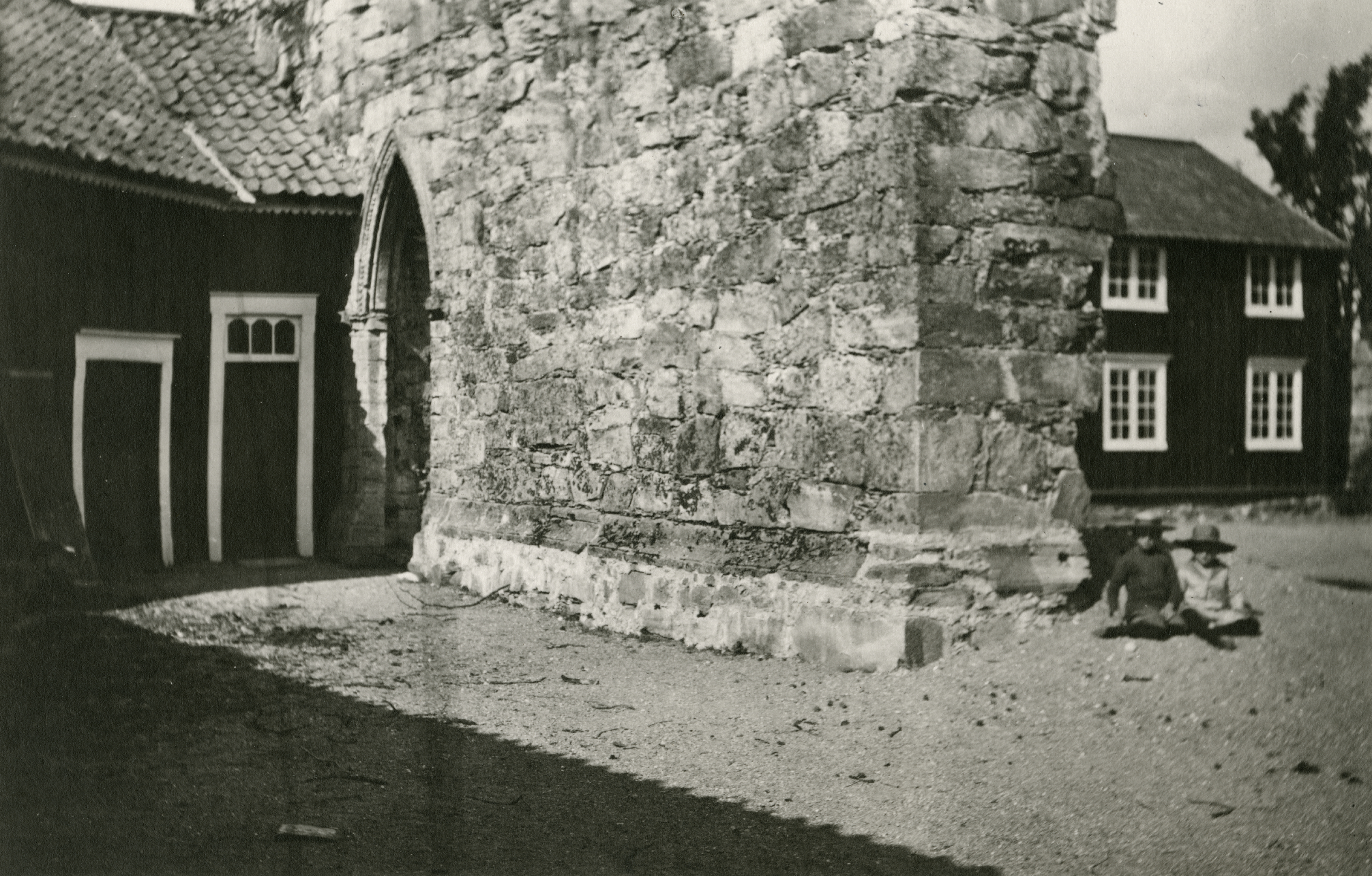 Rein kloster i Rissa, Sør-Trøndelag This image on crowdsourcing geotagging platform Fotodugnad